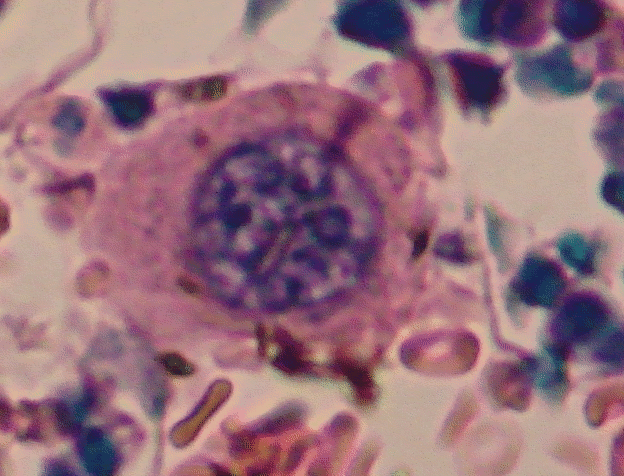 Megakaryozyt - als Ausschnittsvergrößerung aus WVSOM_Megakaryocytes.JPG auf commons